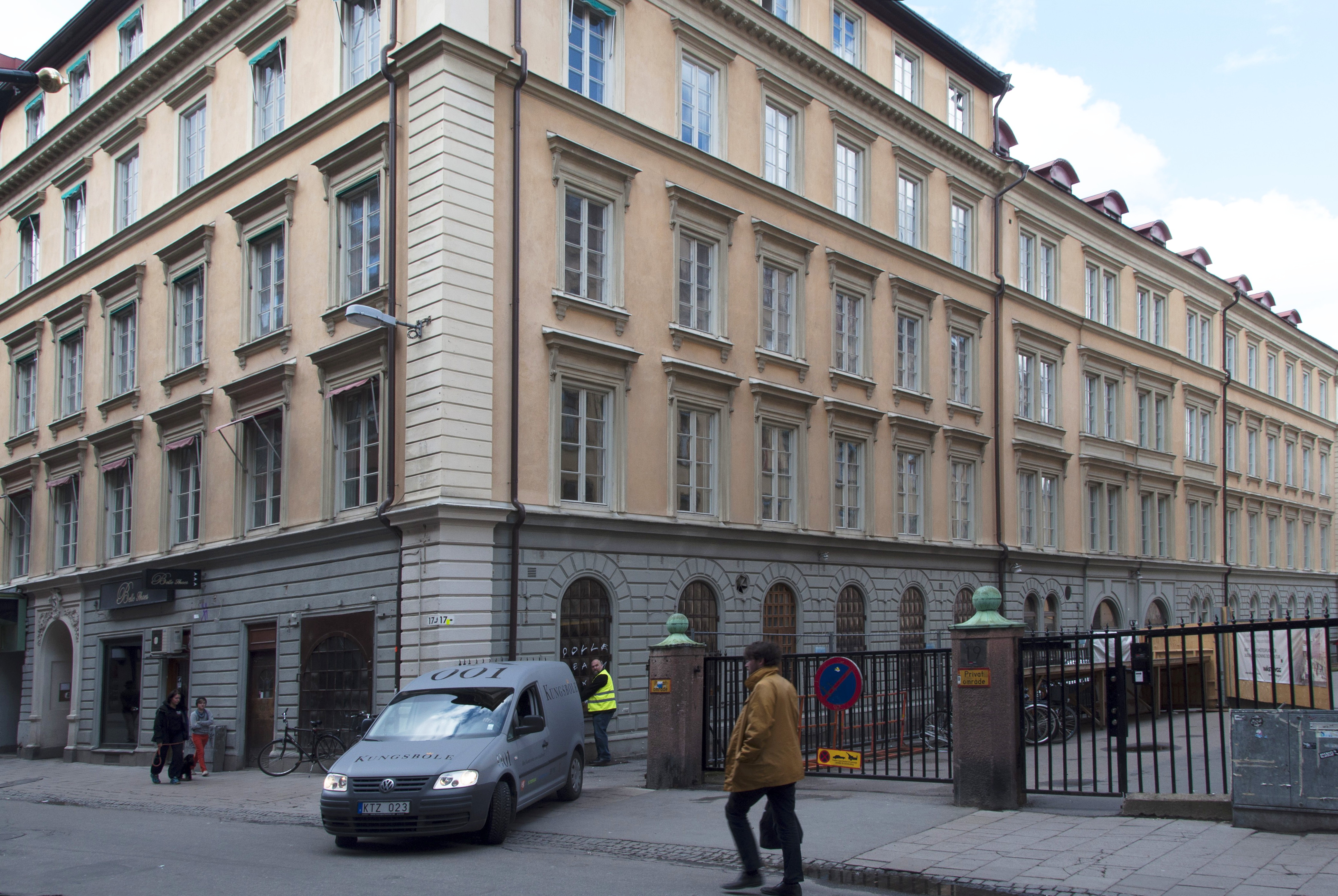 Astoriahuset, Nybrogatan 15-17, Nybyggnadsår 1873, AB Stockholms Byggnadsförening (Byggherre) AB Stockholms Byggnadsförening (Byggmästare) Julius Forsell (Arkitekt)